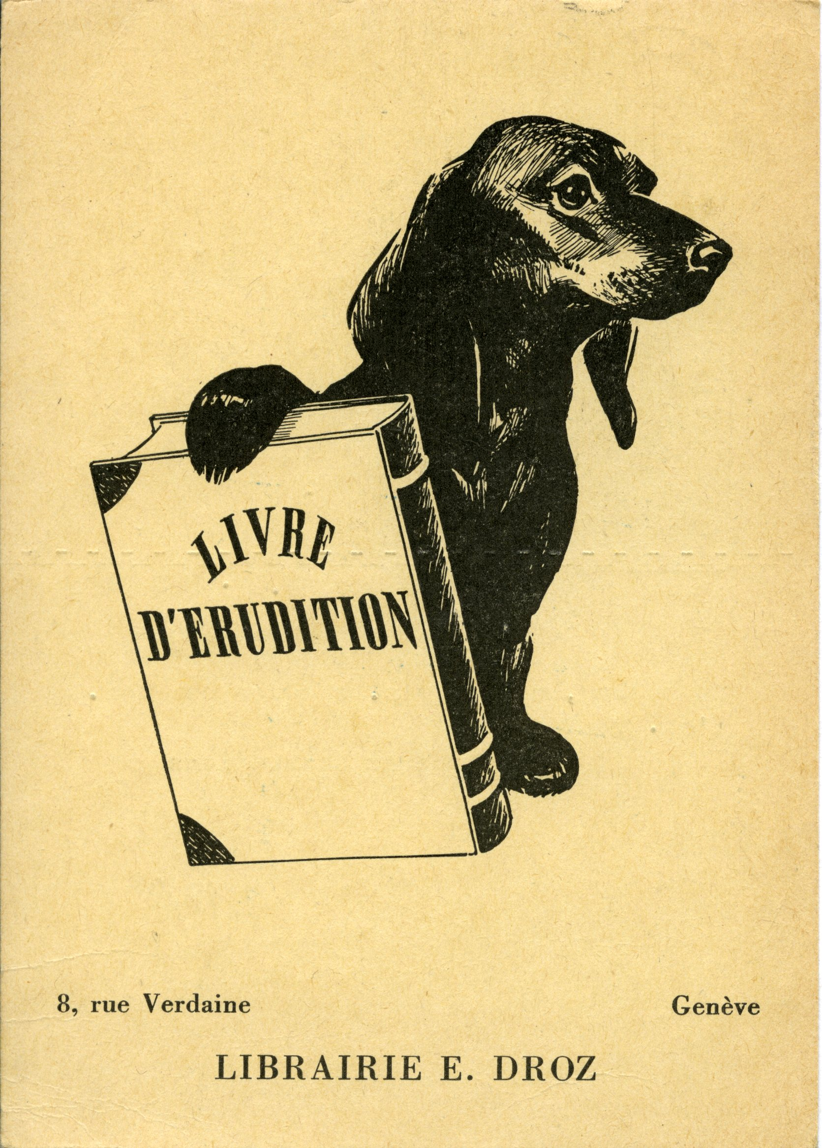 carte publicitaire